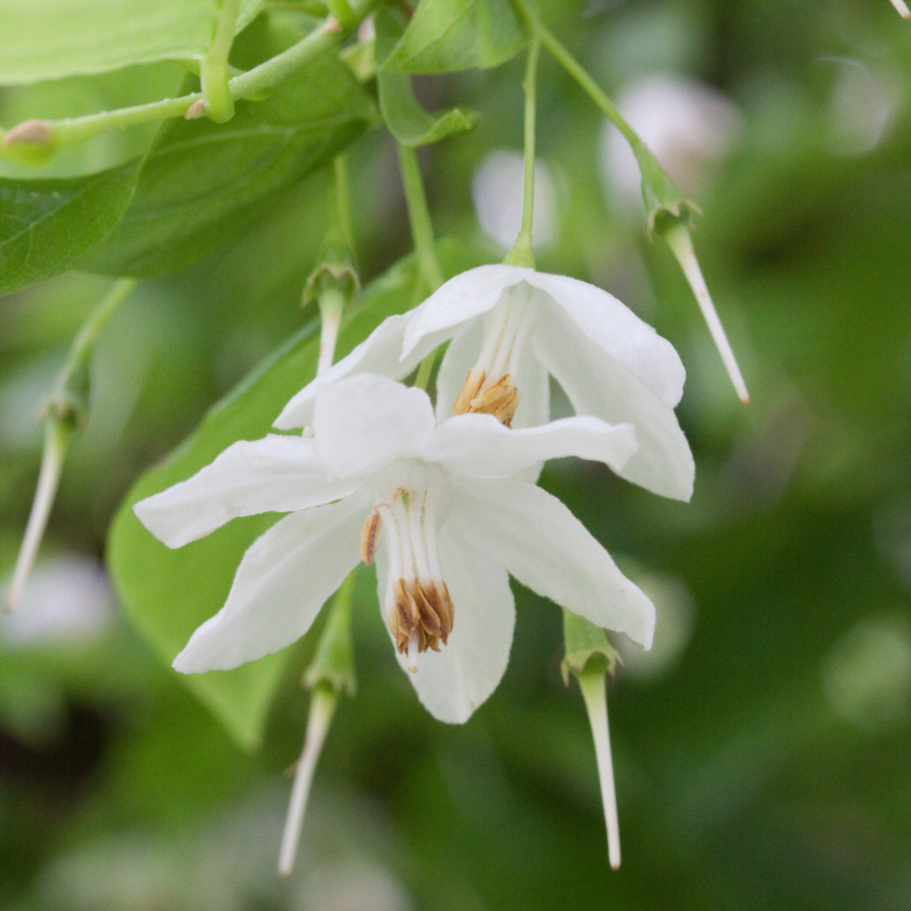 Fleurs de Sinojackia xylocarpa - Jardin botanique de Strasbourg - FRANCE